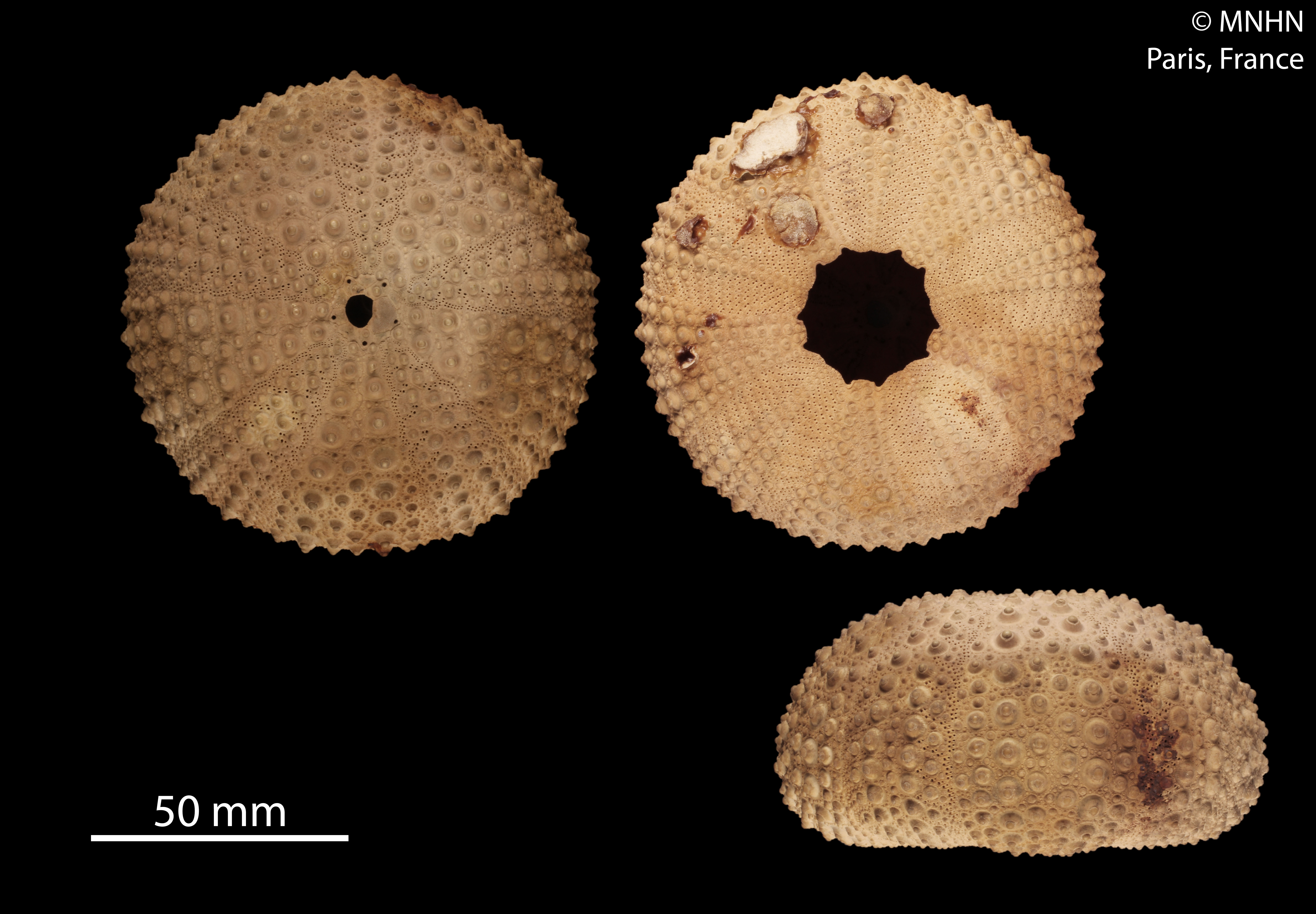 Heliocidaris tuberculata, collection du Muséum National d'Histoire Naturelle (Paris, France). Libellé du pays : Mers australes Localité/Lieu-dit : Mers australes Nom du collecteur : Péron & Lesueur Expédition : BAUDIN Navire : Le Géographe et Le Naturaliste Numéro de station : BAUDIN4